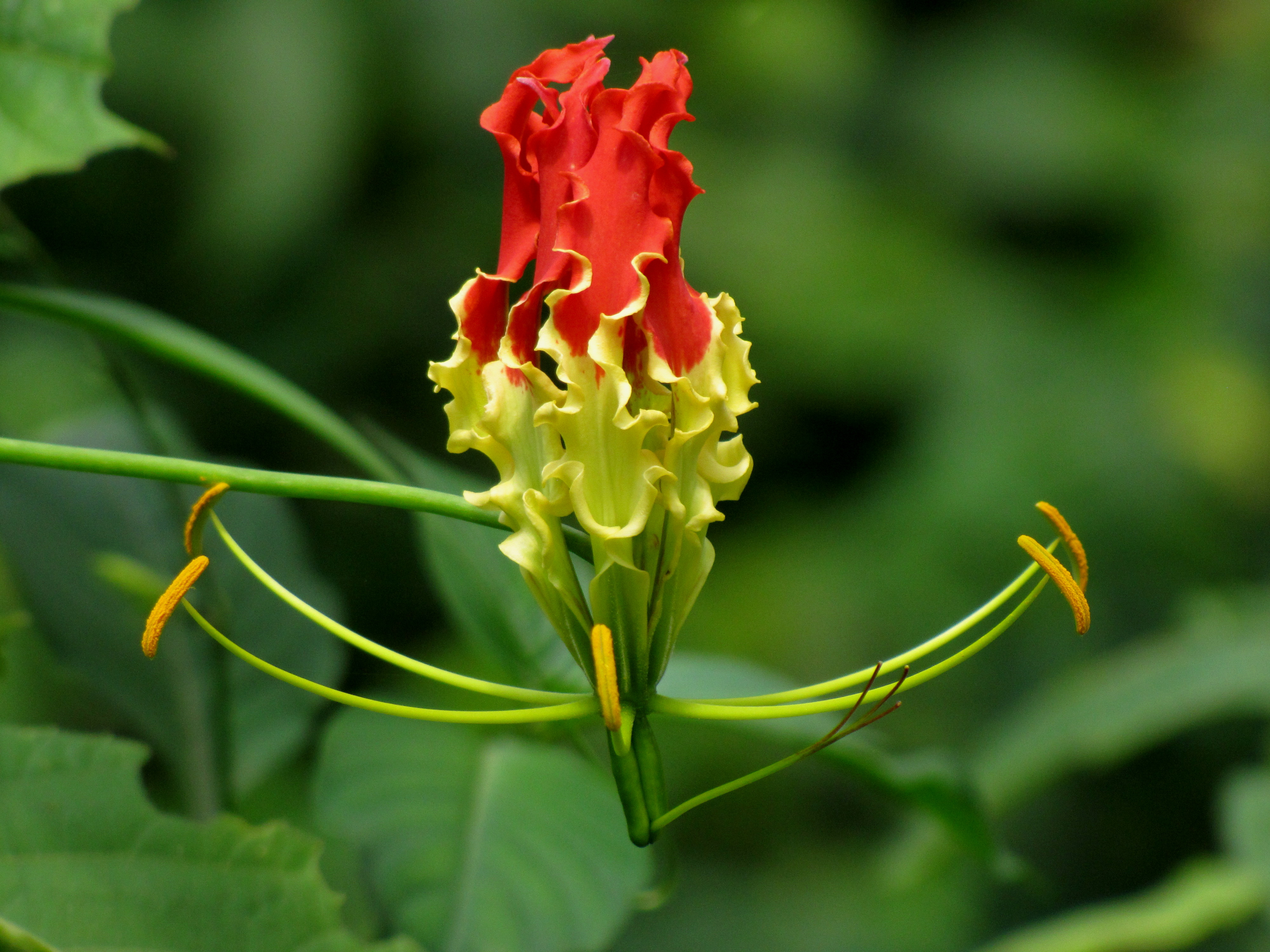 Gloriosa superba from Koovery